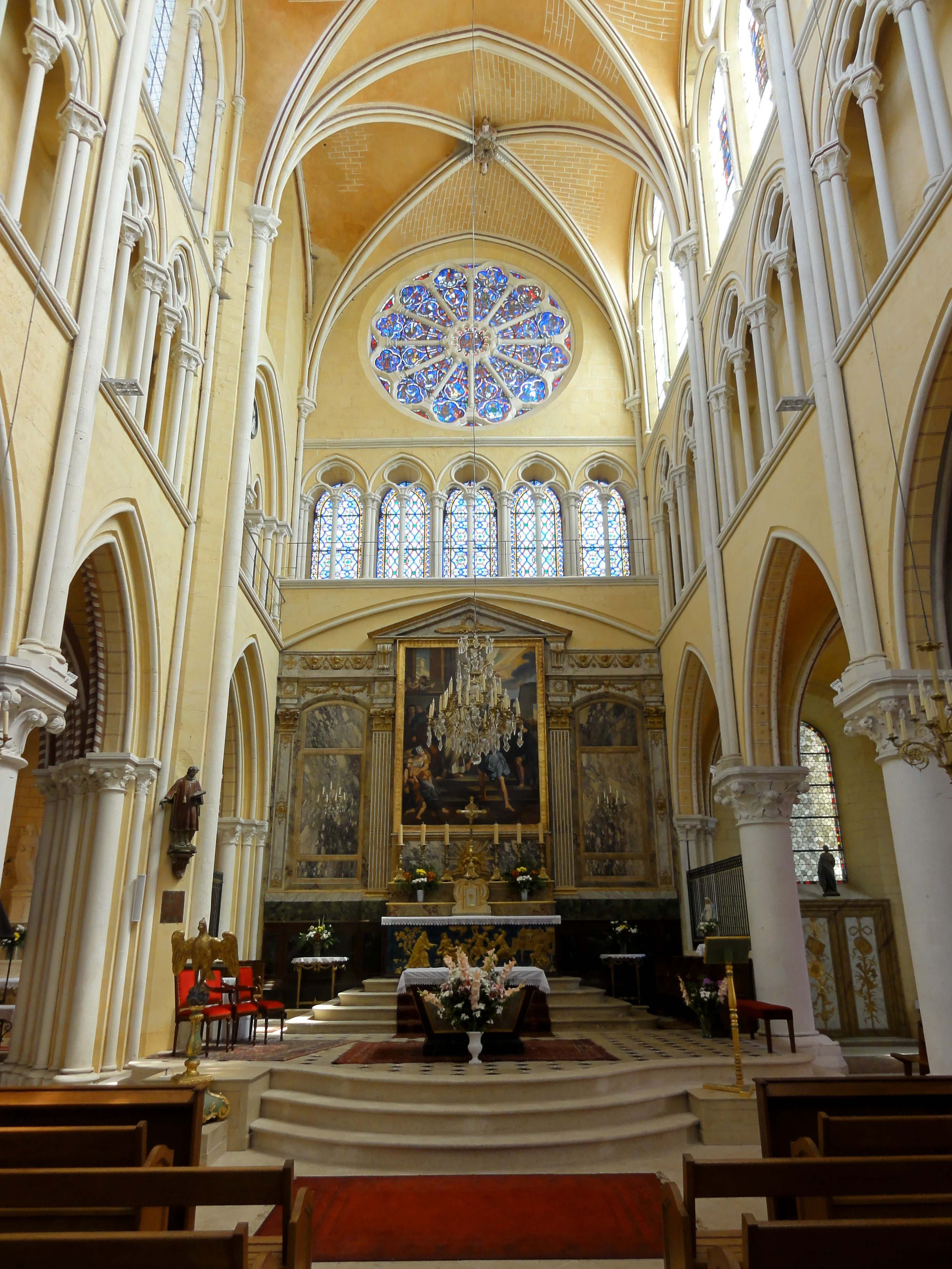 Voir titre.